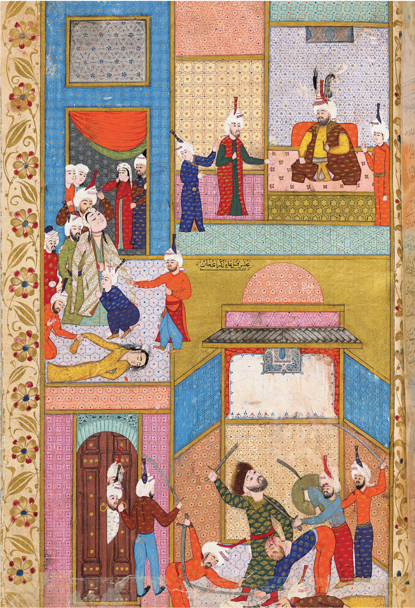 Adil Giray Han’ın Öldürülmesi